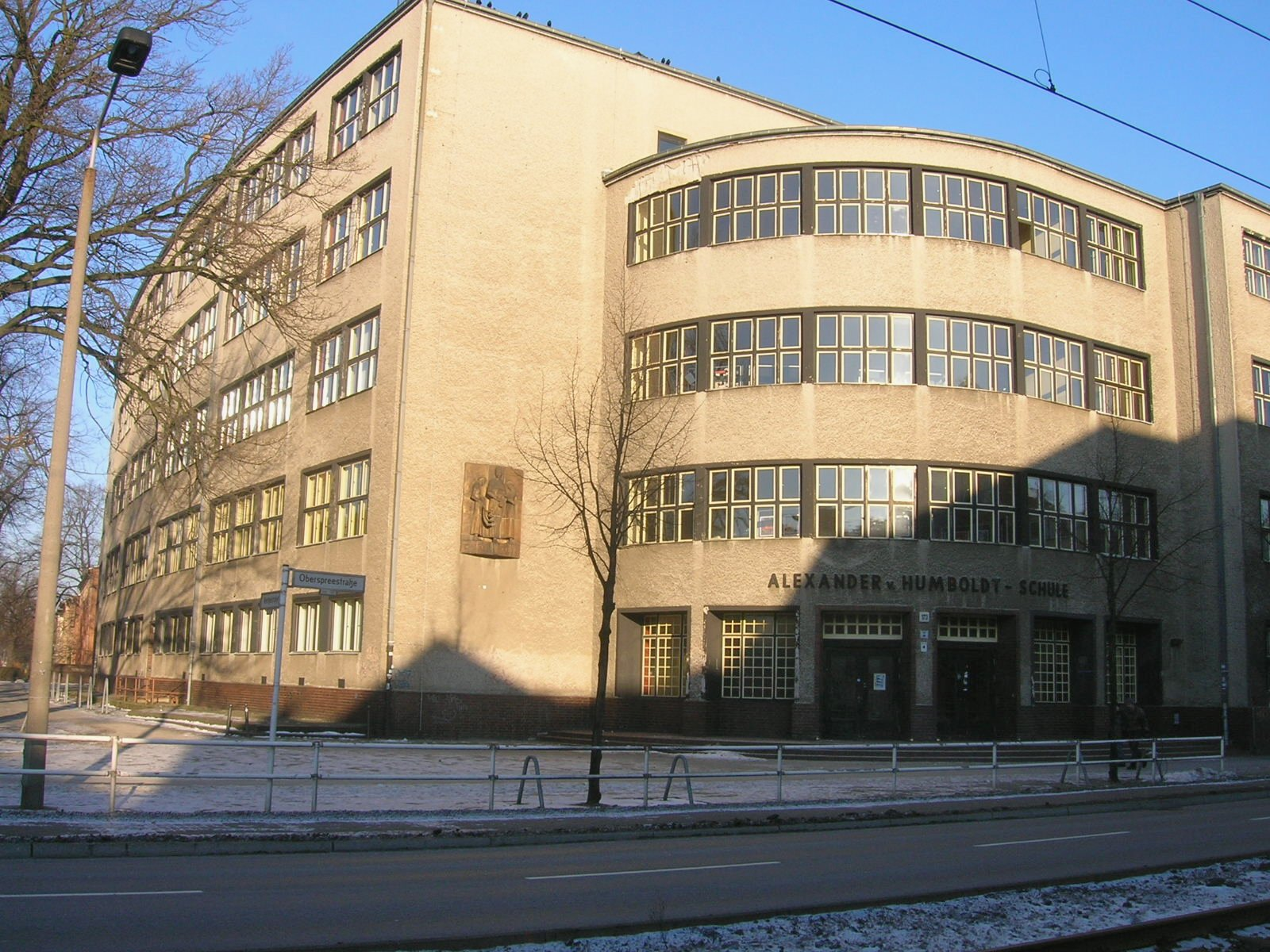 Berlin-Köpenick, Alexander-von-Humboldt-Oberschule, Architekt: Max Taut) taken by Mazbln on January 22, 2006